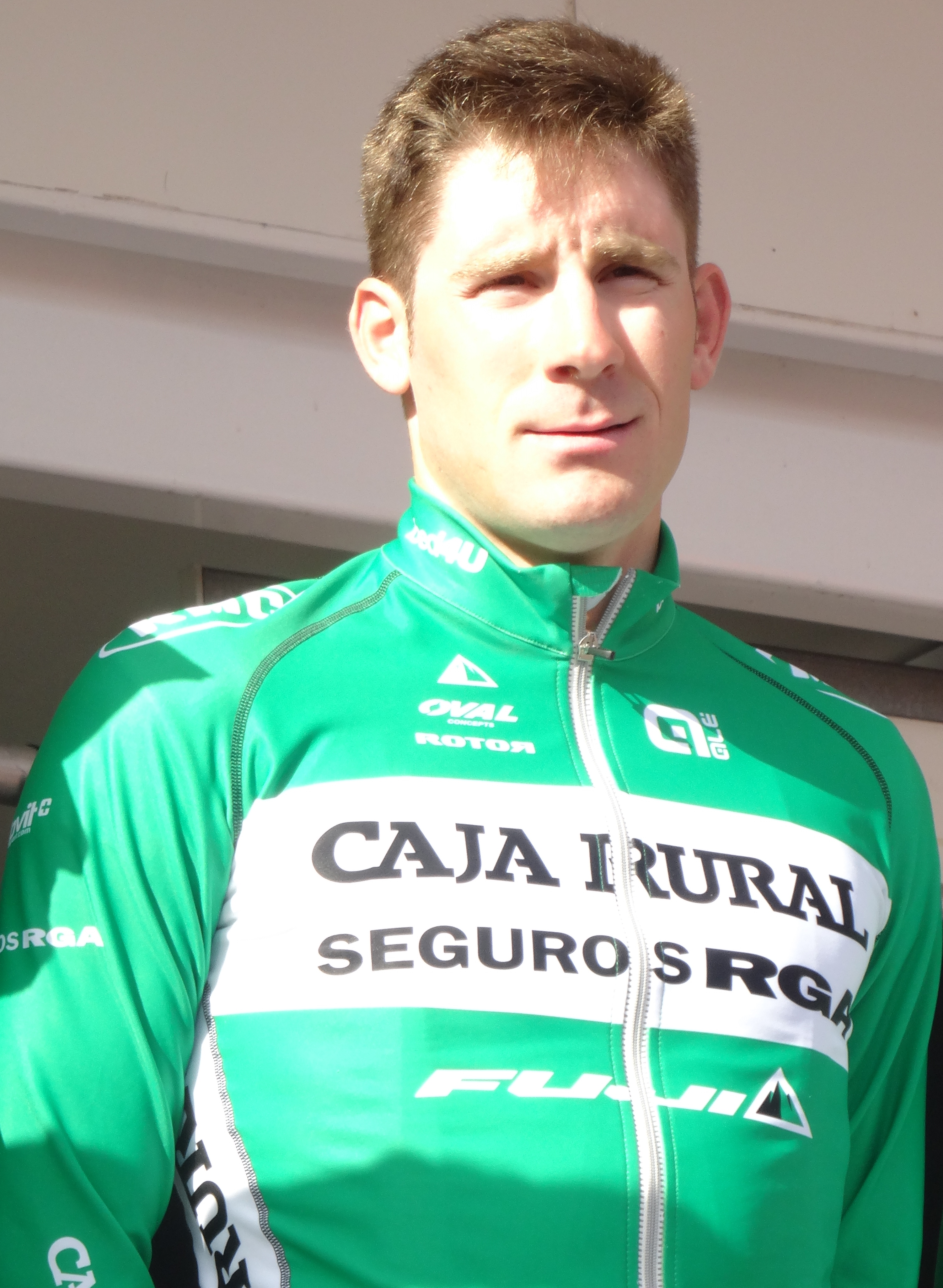 Reportage réalisé le mercredi 4 mars à l'occasion du départ du Samyn des Dames 2015 et du Samyn 2015 à Quaregnon, Belgique.